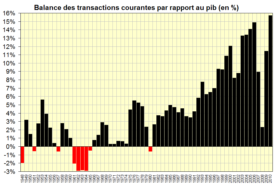 Balance des transactions courantes par rapport au pib (en %)